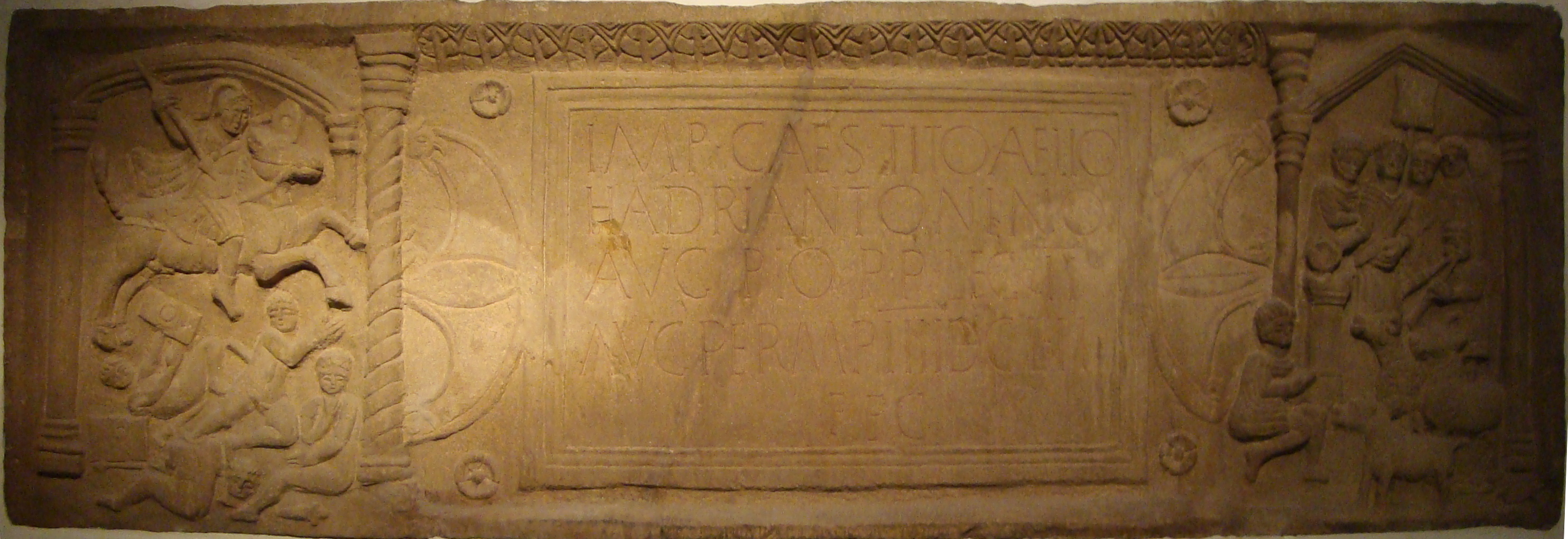 Römisches Relief aus der Nähe des Antonius Walles bei Bridgeness.CIL VII 1088 = RIB. 1, 2139: Imp(eratori) Caes(ari) Tito Aelio / Hadri(ano) Antonino / Aug(usto) Pio p(atri) p(atriae) leg(io) II / Aug(usta) per m(ilia) p(assuum) IIIIDCLII / fec(it) // Leg(io) II Aug(usta)